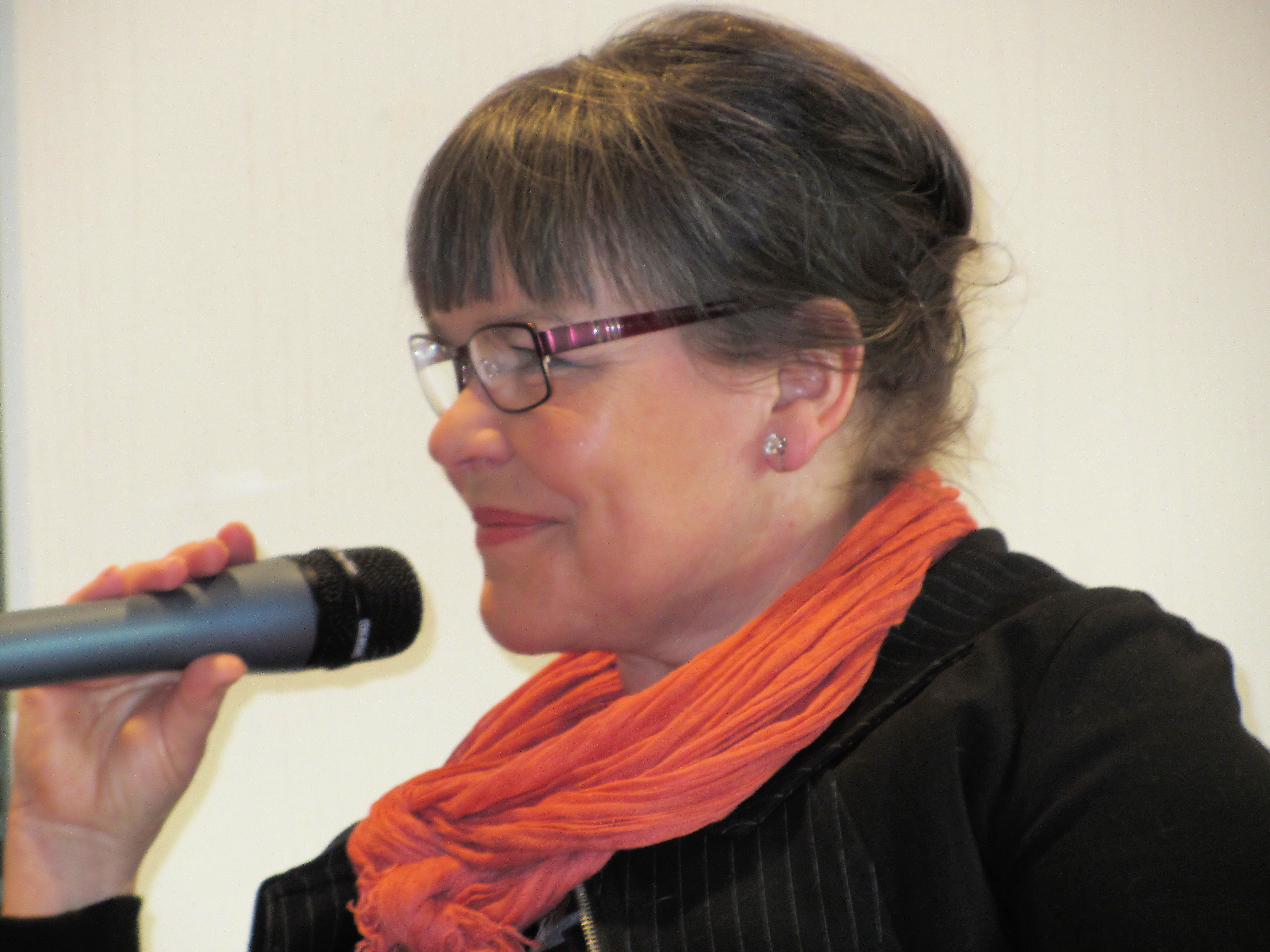 Toimittaja Marketta Mattila haastatteli Miina Supista, Tommi Liimattaa ja Matti Rönkää Keravan kaupunginkirjastossa huhtikuussa 2014.